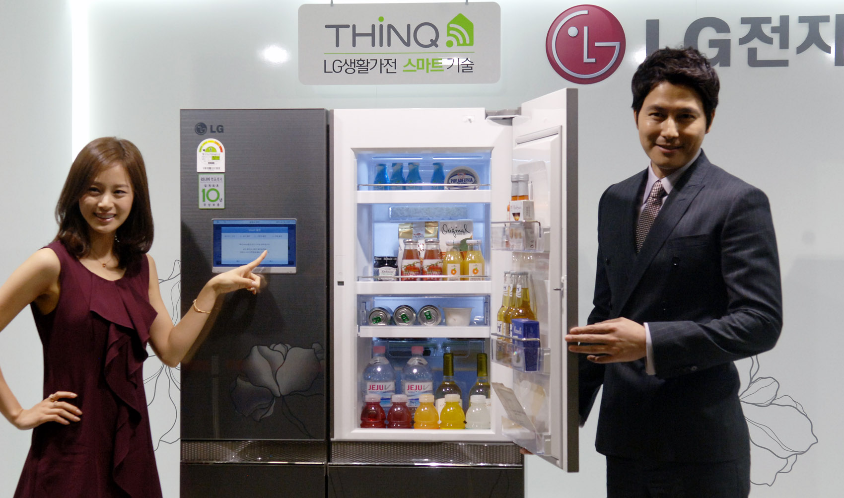 LG전자가 19일 양재동 서초R&D센터에서 이영하 HA사업본부장, 최상규 한국마케팅본부장 등 경영진과 디오스 냉장고 광고모델 정우성, 김태희 등이 참석한 가운데 ‘스마트 가전 신제품 발표회’를 열었다. 사진은 LG전자 디오스 냉장고 모델인 정우성(우측), 김태희씨가 국내에 출시한 850리터 '스마트 냉장고'를 소개하고 있다.